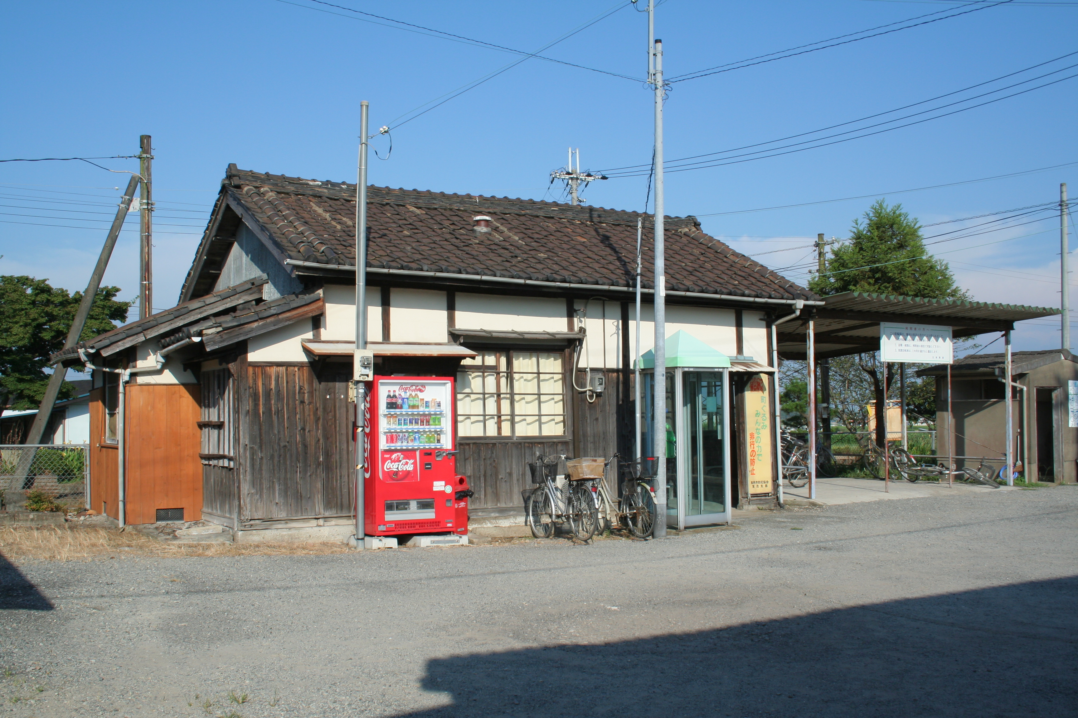 長駅。日本にある鉄道駅の一つ。 長駅駅舎。駅舎は集落の中にあり、道路案内などの標識が無い為、車でのアクセスは少し困難である。